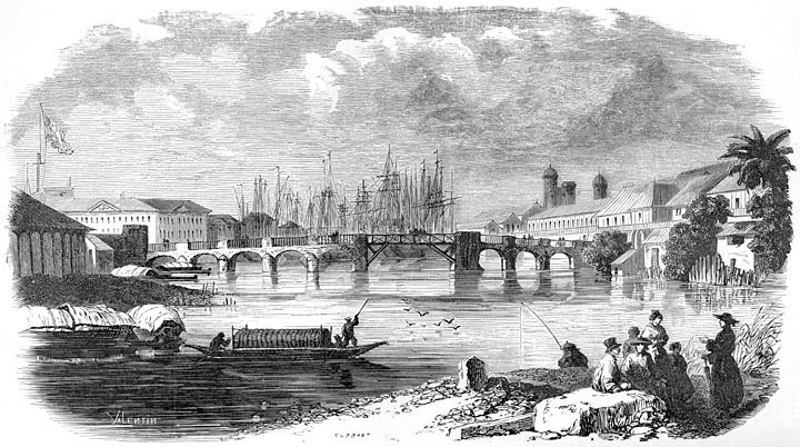 Bridge of Binondoc in Manila, early 1800s. Original caption: Pont de Binondoc à Manille. From Aventures d'un Gentilhomme Breton aux iles Philippines by Paul de la Gironiere, published in 1855.